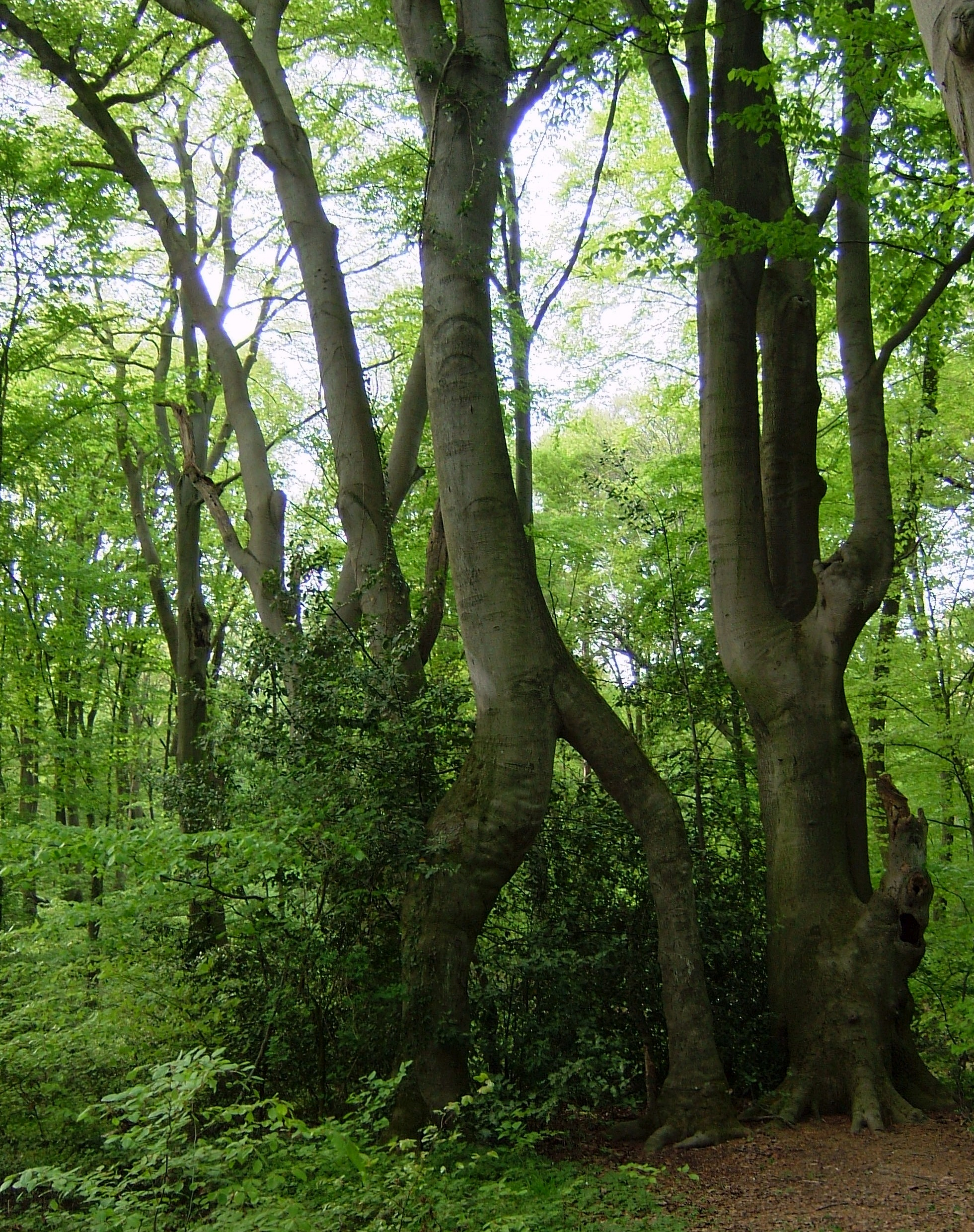 Zweibeinige Buche am Lehrpfad „Bonner Weg der Artenvielfalt“ nahe der Waldau